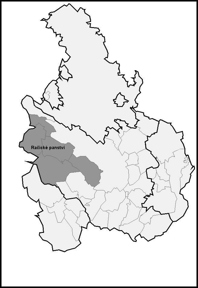 Račické panství (Vyškov- Czech republic)